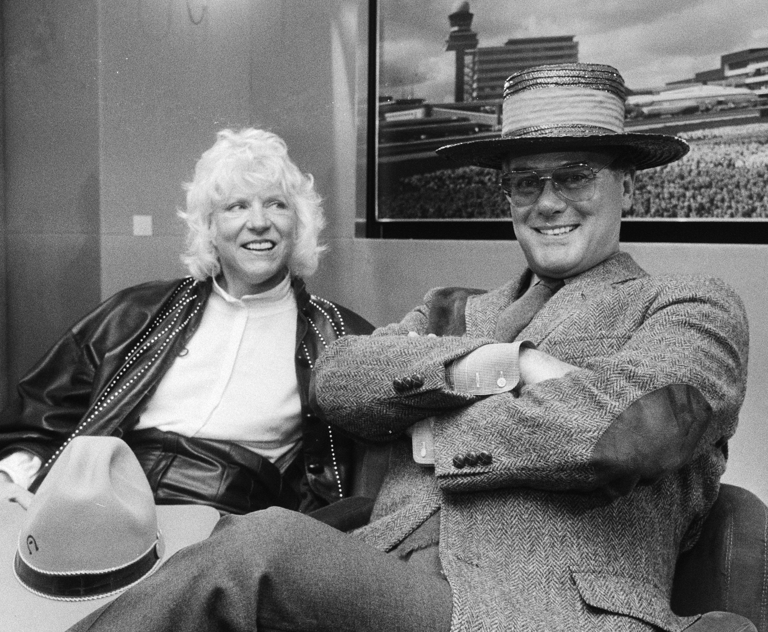 Larry Hagman, met cowboyhoed, vergezeld door zijn echtgenote